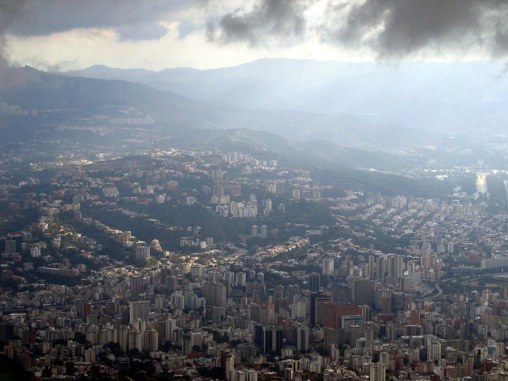 Caracas desde El Avila